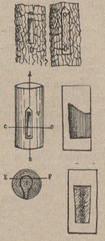 Беларуская (тарашкевіца): Канструкцыя борці, з розных бакоў